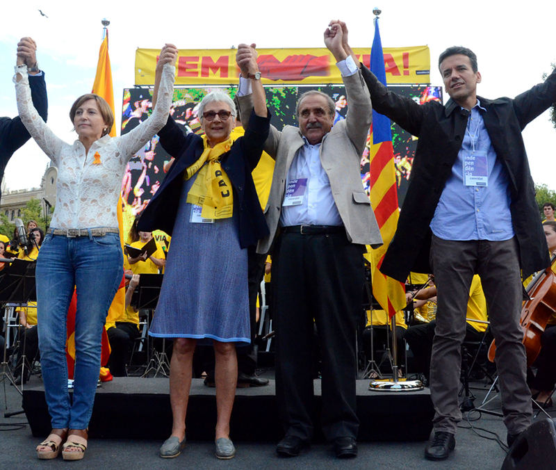 La Via Catalana a Barcelona. Plaça Catalunya.